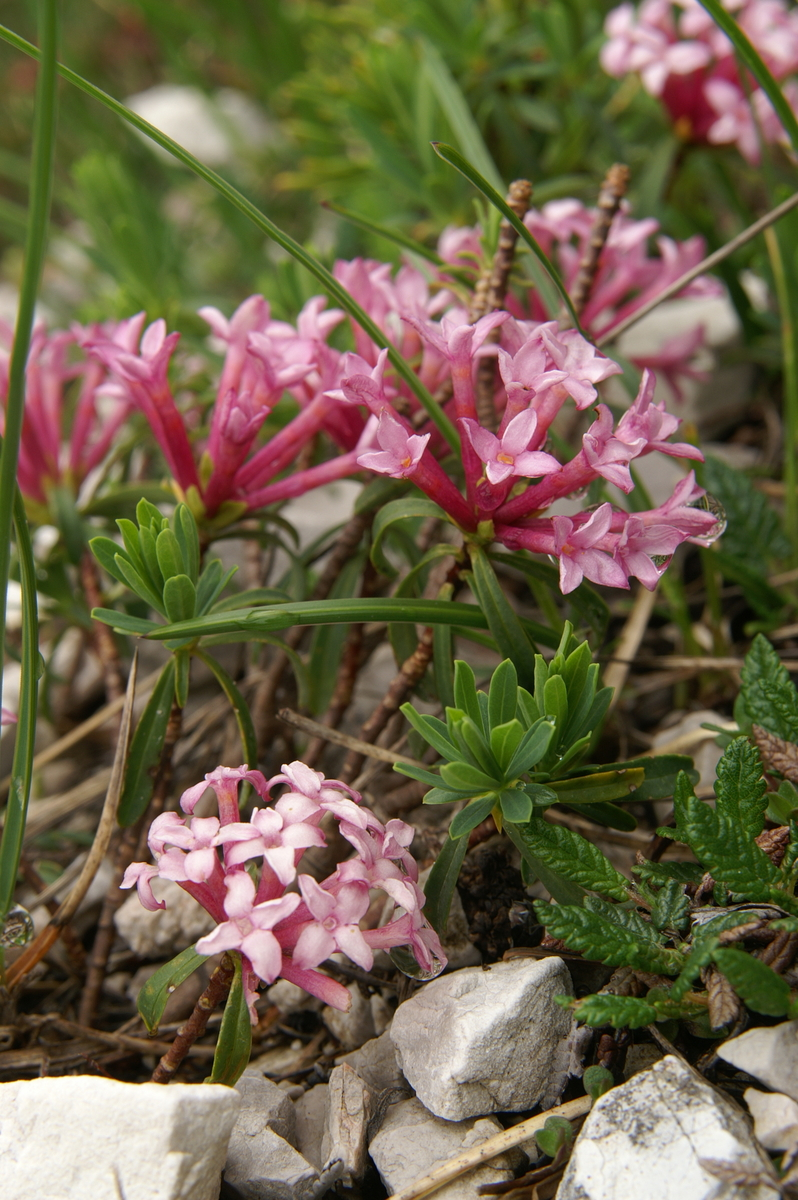 Progasti volčin na Kepi.